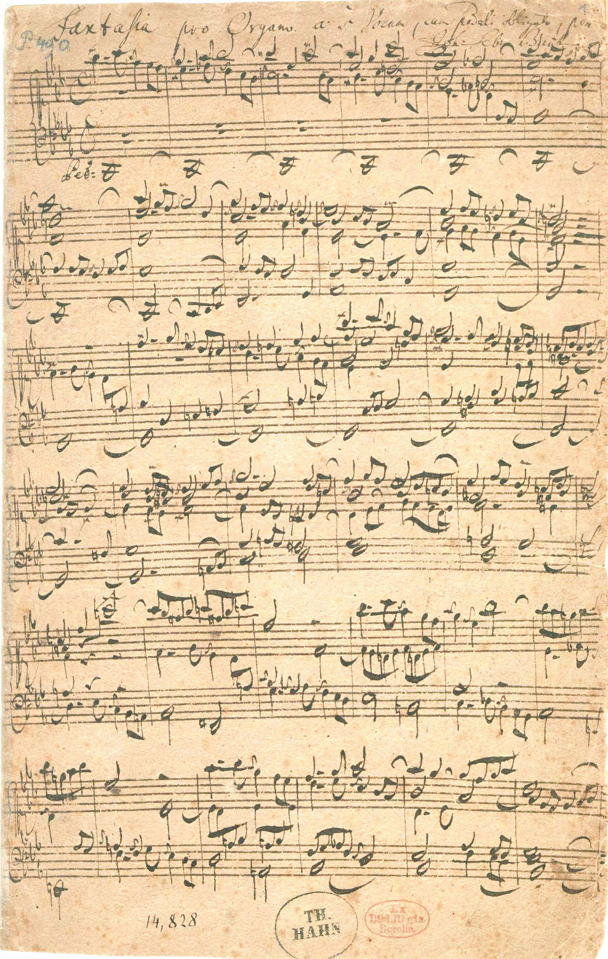 Fantaisie et fugue en ut mineur, BWV 562 (ms. Berlin, P. 140). Page 1.